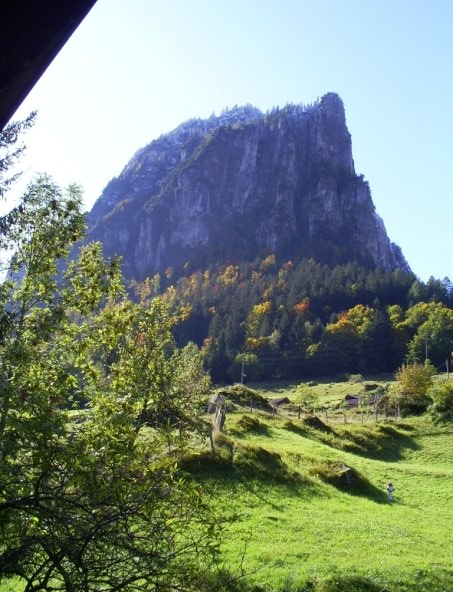 Bild des Berges Loibstock